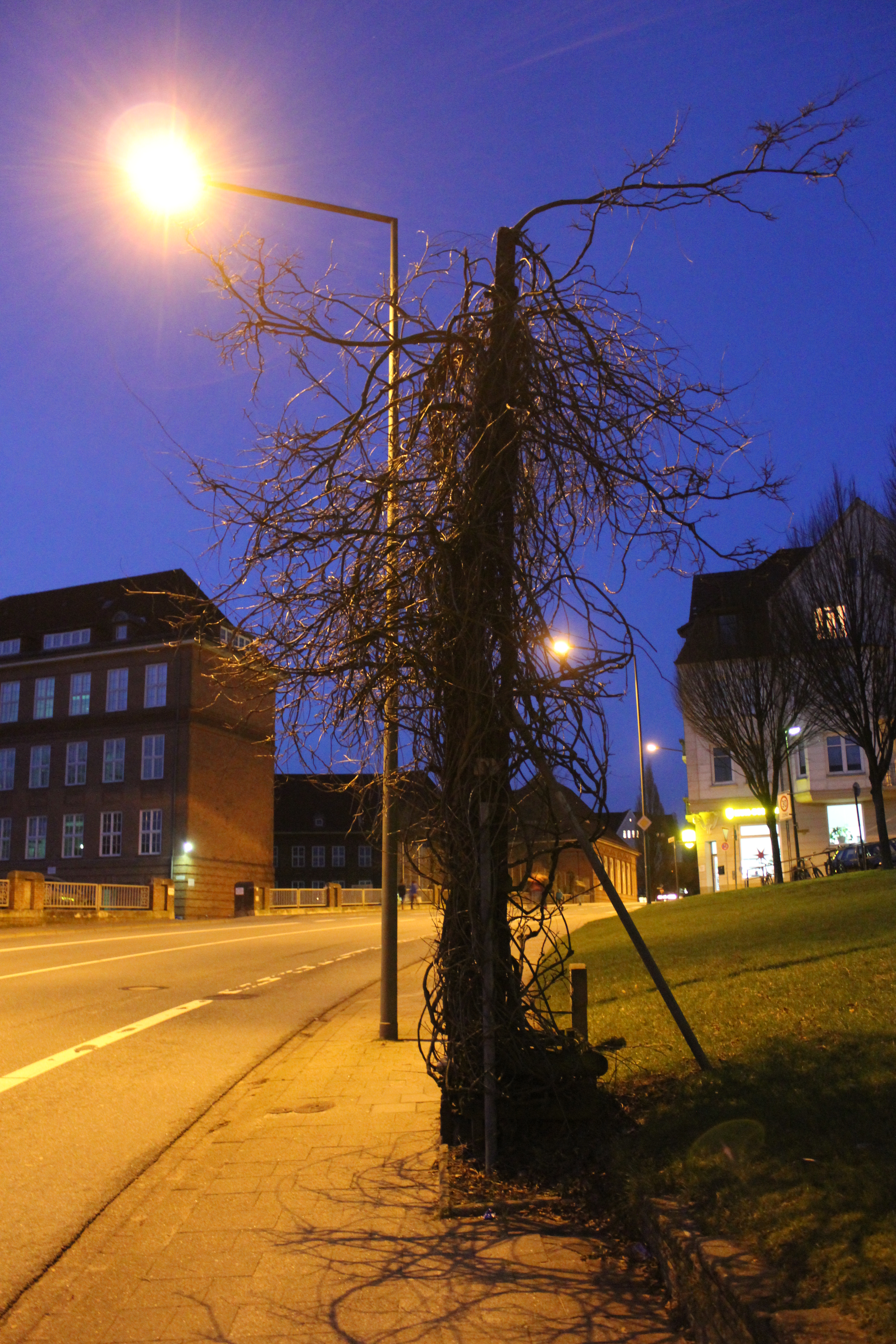 Der letzte Straßenbahnmast in der Bismarckstraße zur Nacht (Flensburg 2013)